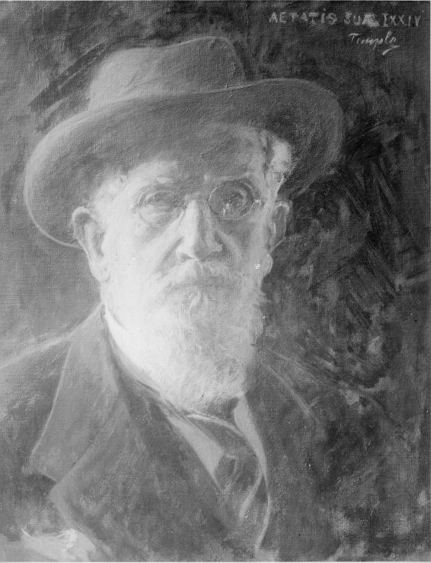 Self-portrait "im 74.Lebensjahr".